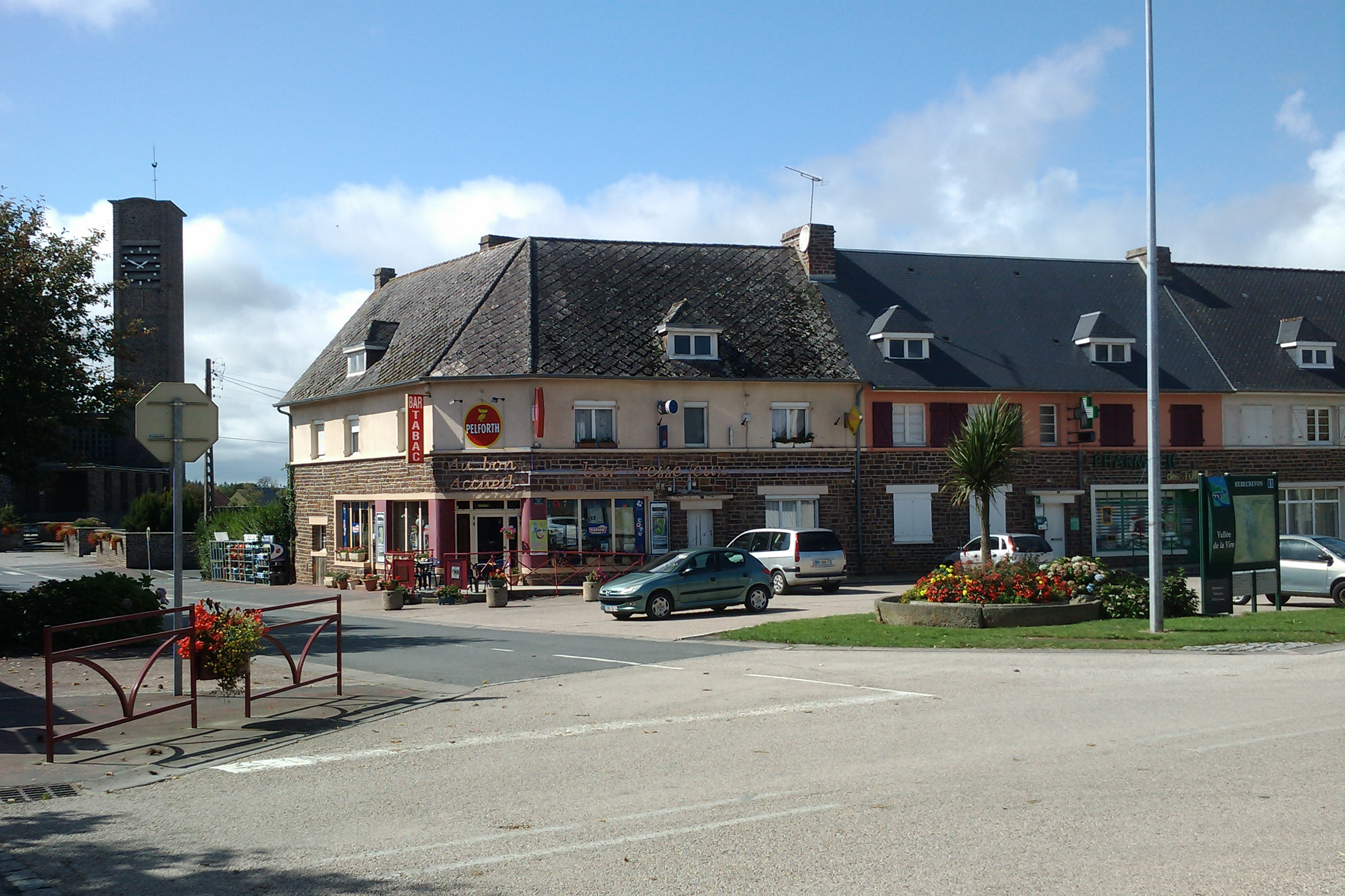 Hébécrevon